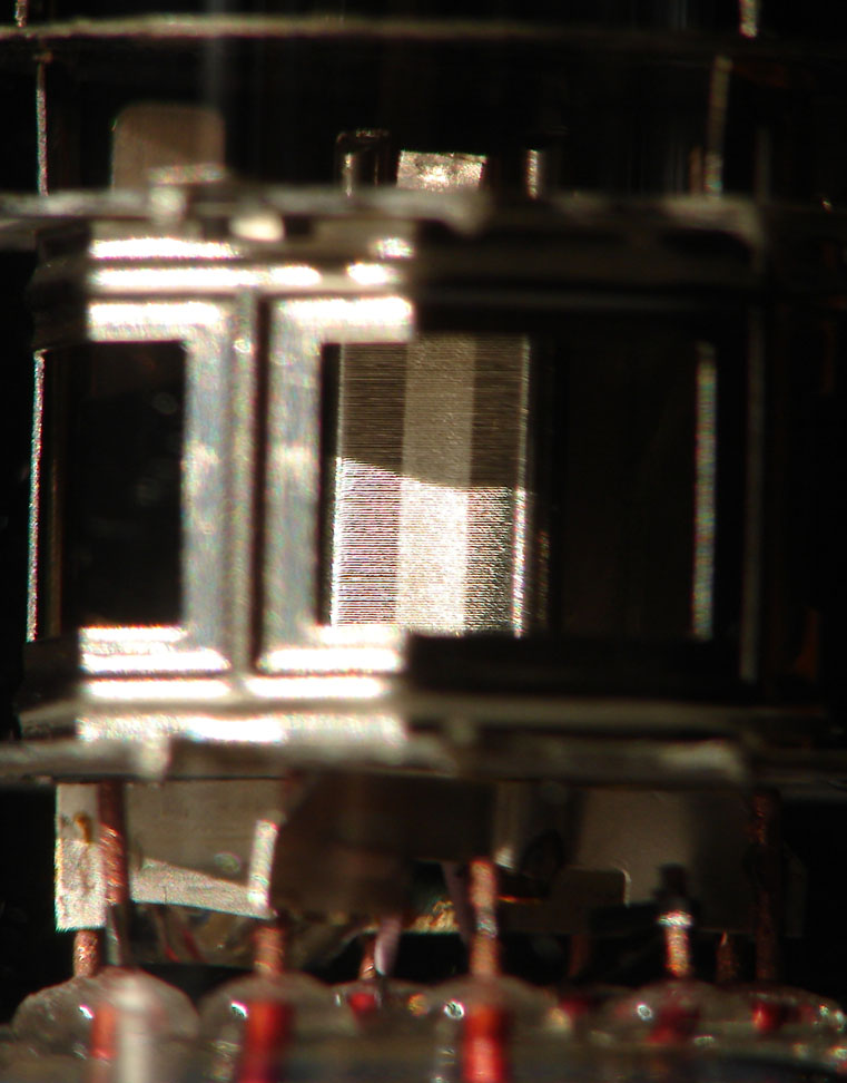 Detailansicht einer geheizten PC88